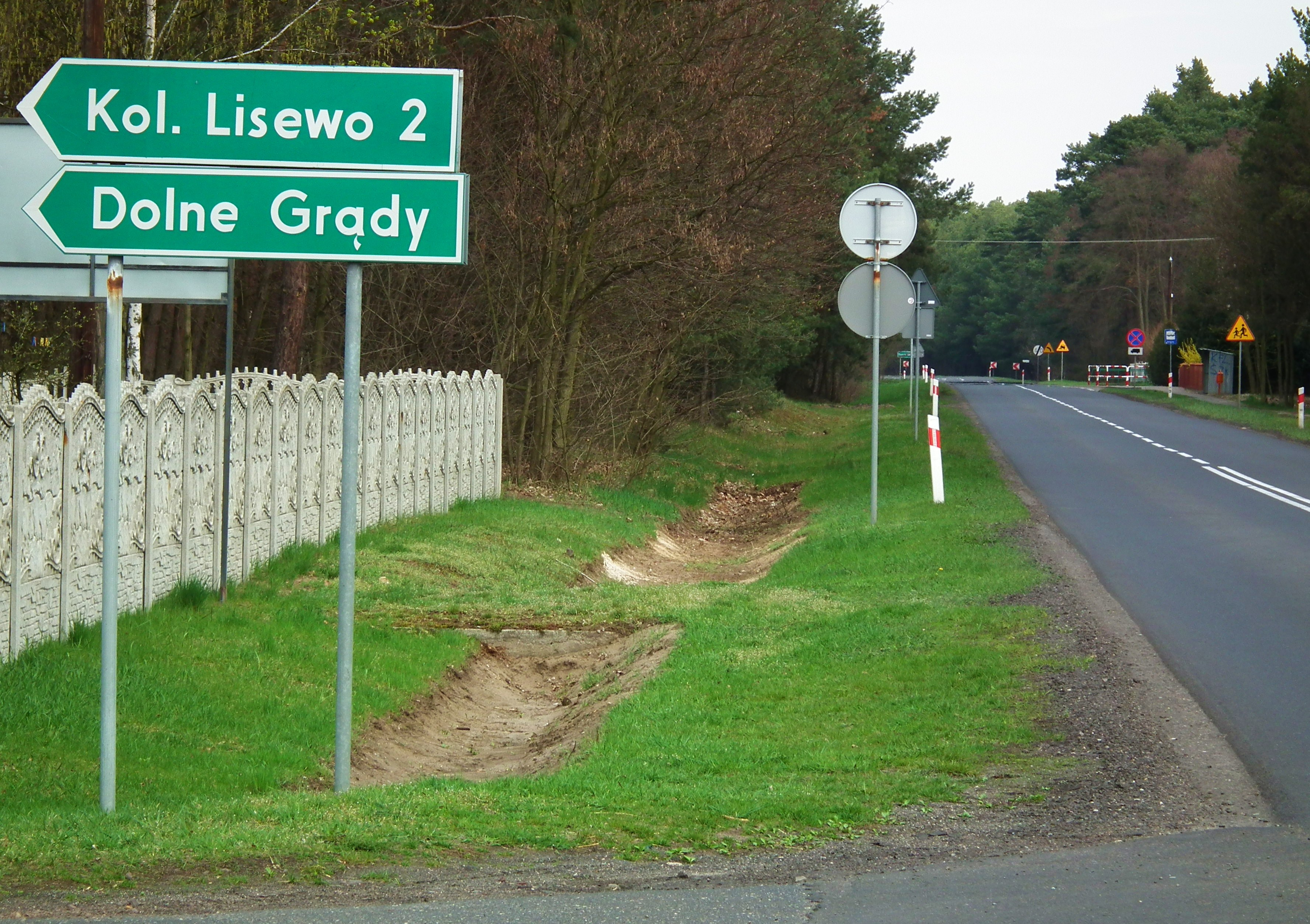 Wieś Górne Grądy w Puszczy Pyzdrskiej.